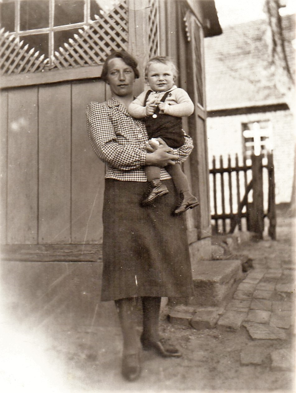 Kappe, Junge Bäuerin mit Sohn, hier Frieda Herta Anna Kriesel, geb. Weber mit Werner Reinhard Ferdinand (1942)